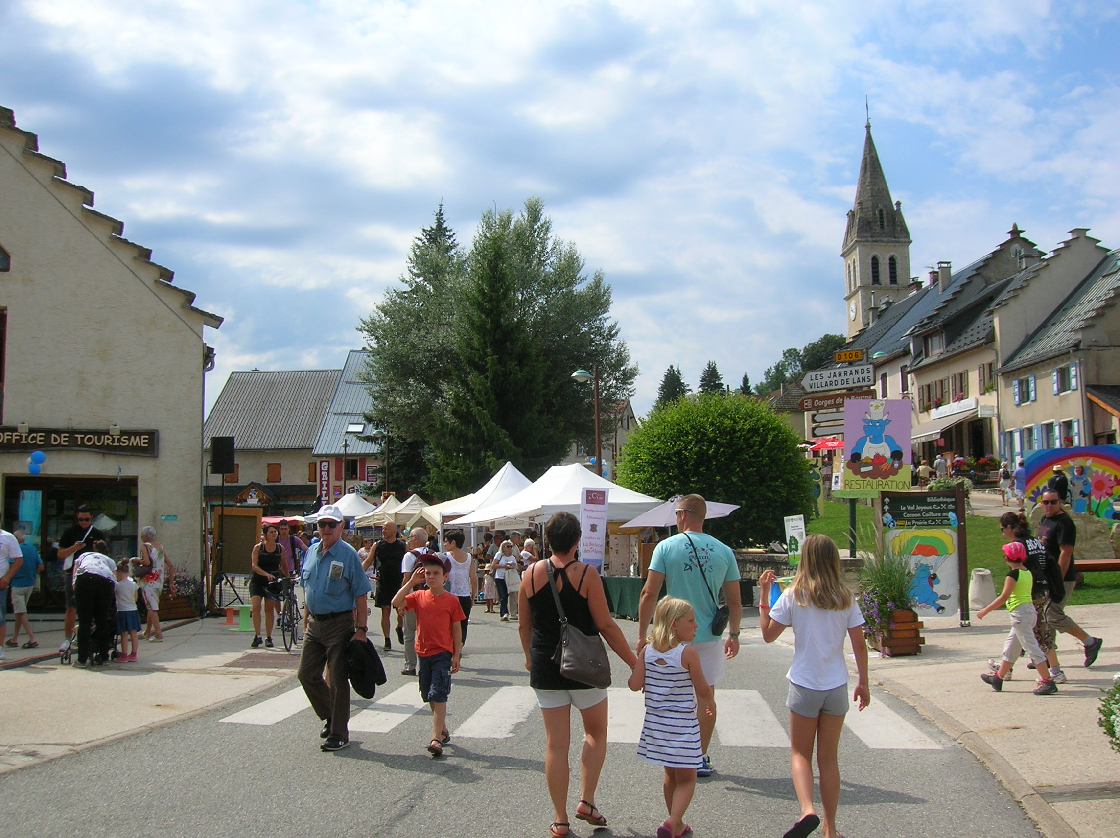 fête du bleu, Méaudre, Isère, France.